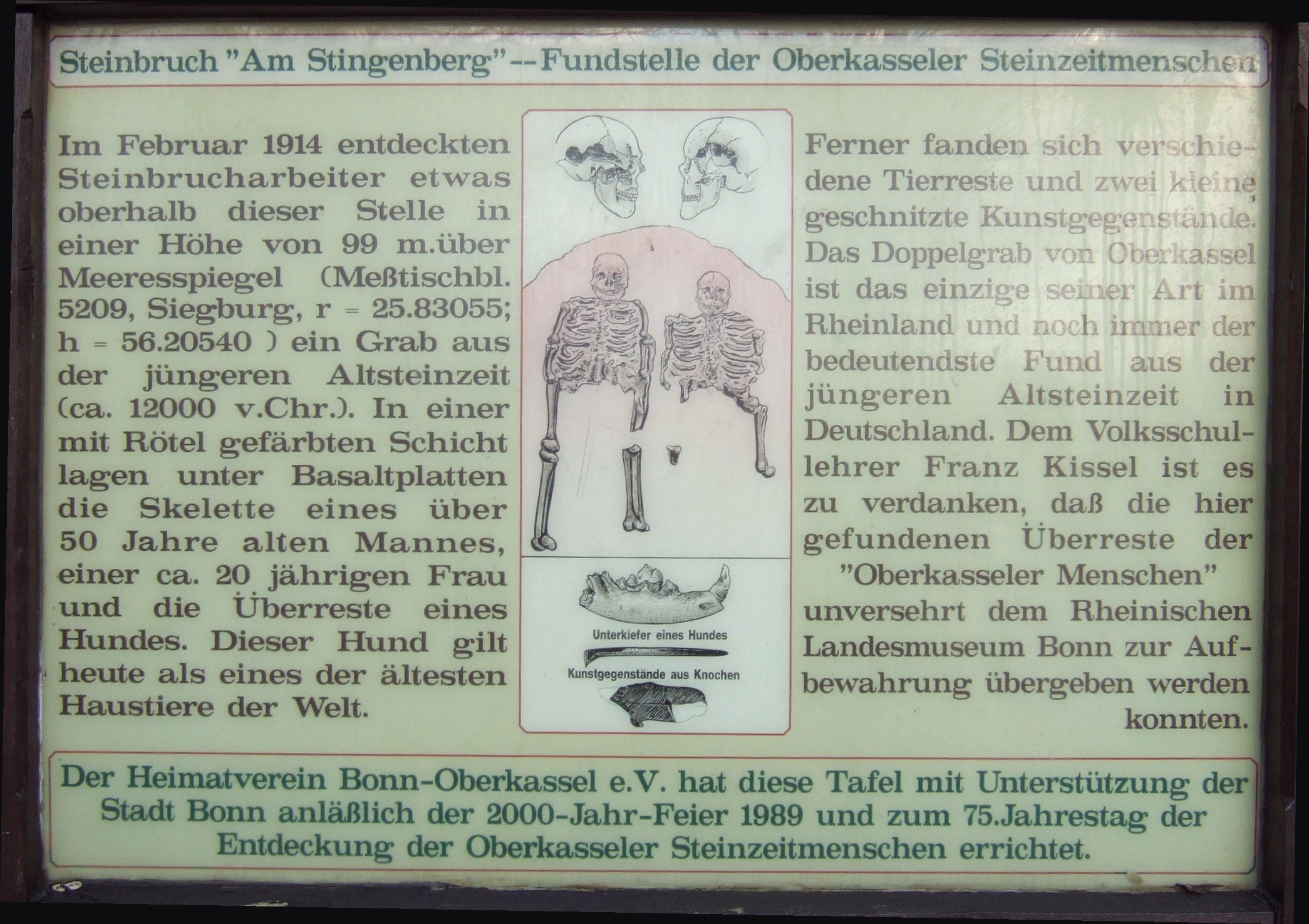 Tafel an der Fundstelle des Doppelgrabes von Oberkassel, Bonn